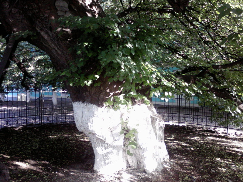 350-річна липа